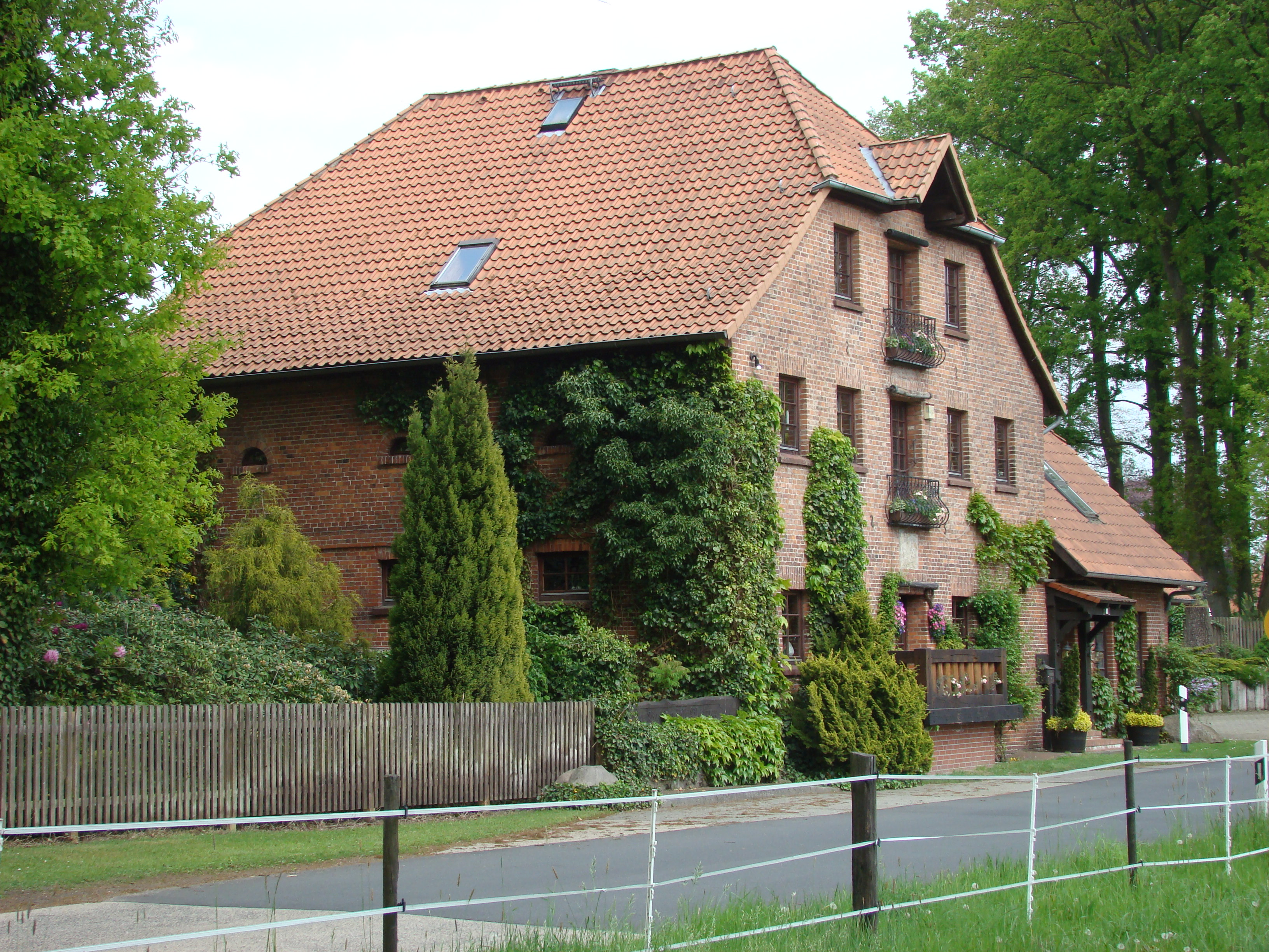 ehemalige Wassermühle in Bleckmar Old water mill in Bleckmar, Lower Saxony, Germany.